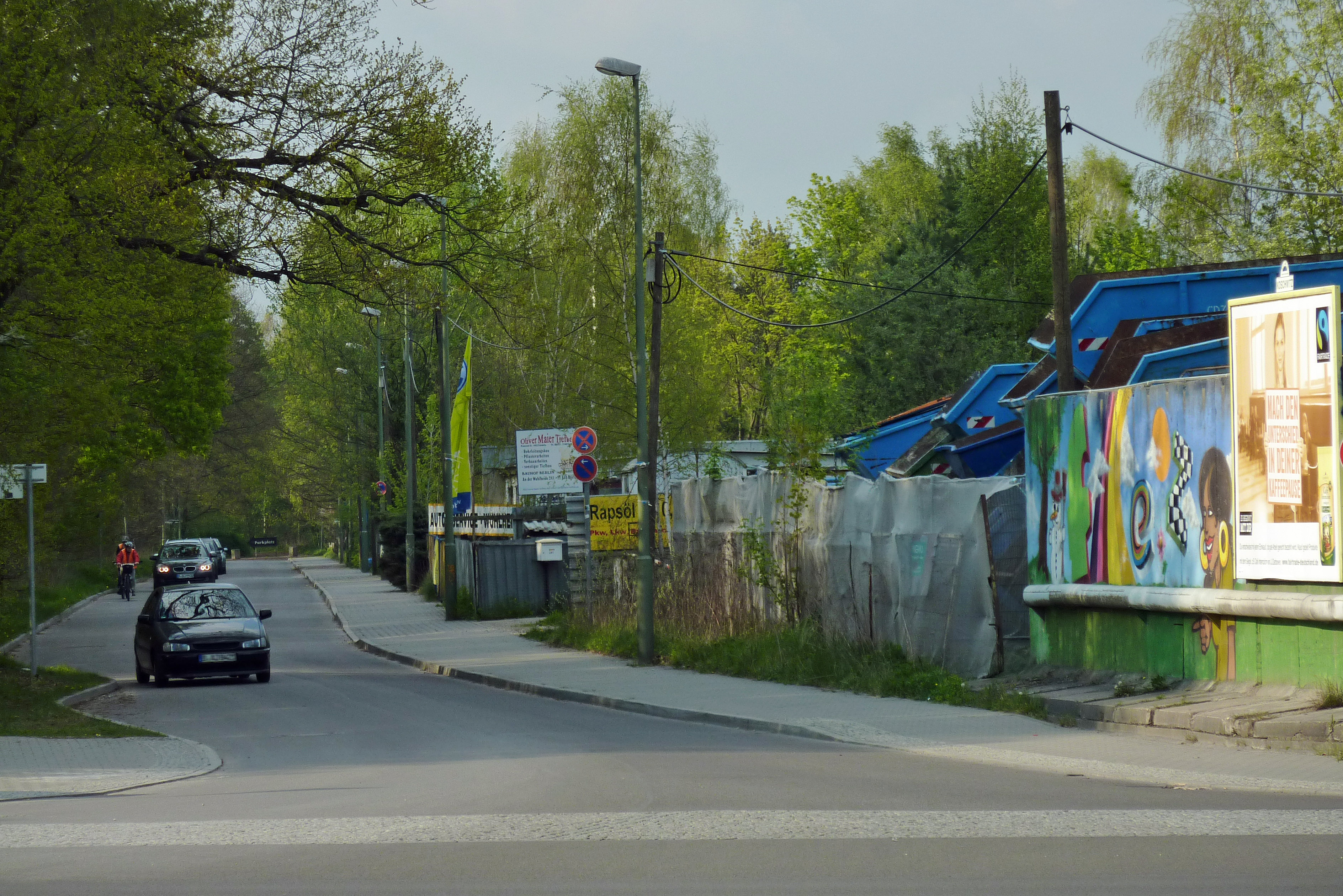 Straße zum FEZ in Berlin-Oberschöneweide. Sicht von An der Wuhlheide.